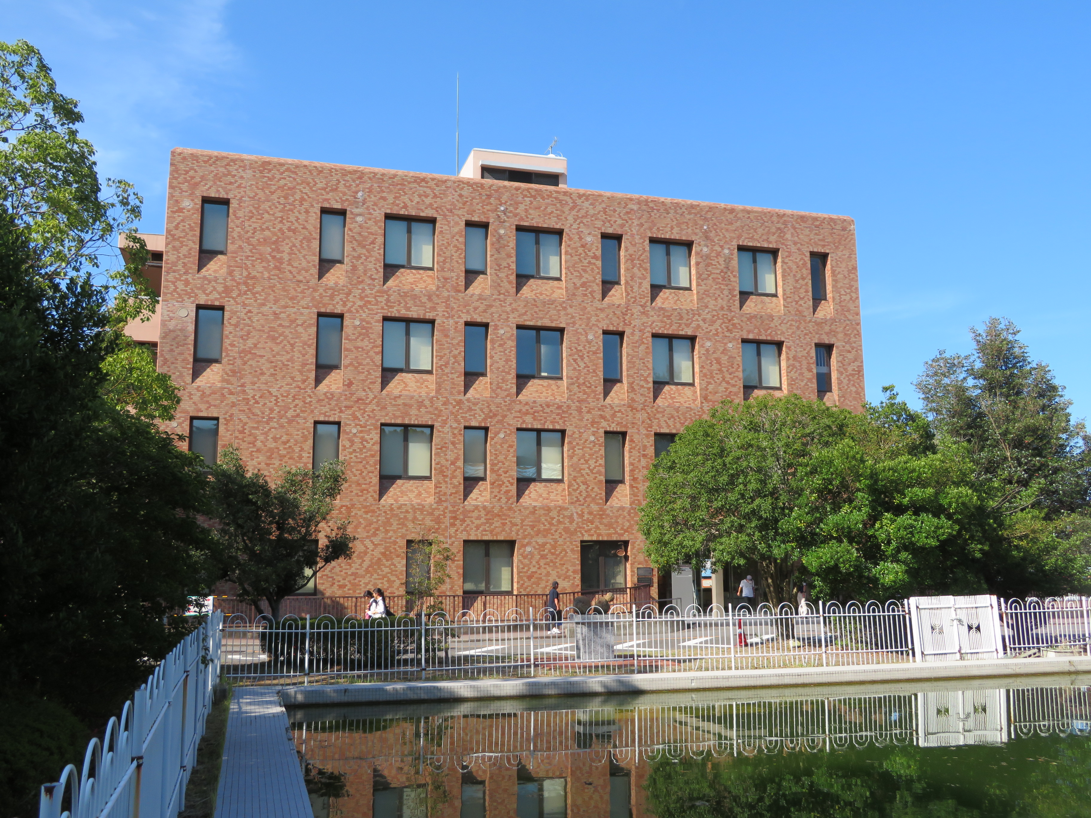 自然科学研究機構（愛知県岡崎市）